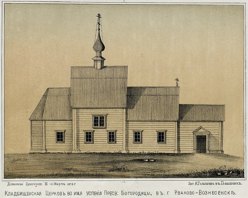 Успенская церковь (Иваново) в 1870-х